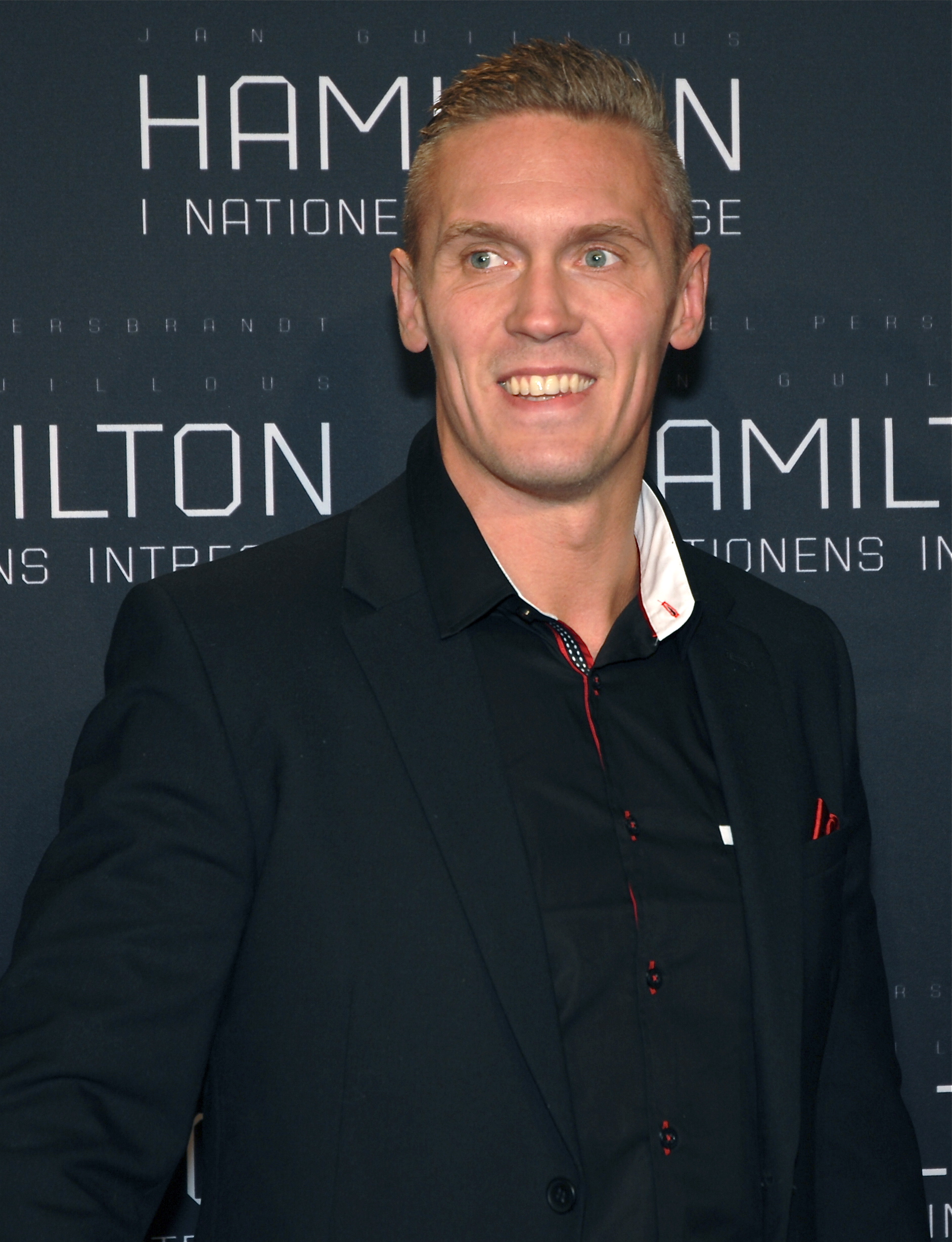 Rickard Nordstrand på galapremiären av Hamilton - I nationens intresse, på biograf Sergel i Stockholm den 9 januari 2012.